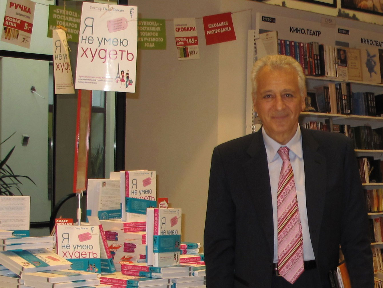 Пьер Дюкан представляет свою книгу «Я не умею худеть» в России. Санкт-Петербург, 13.09.2011, магазин «Буквоед», Невский проспект 46.